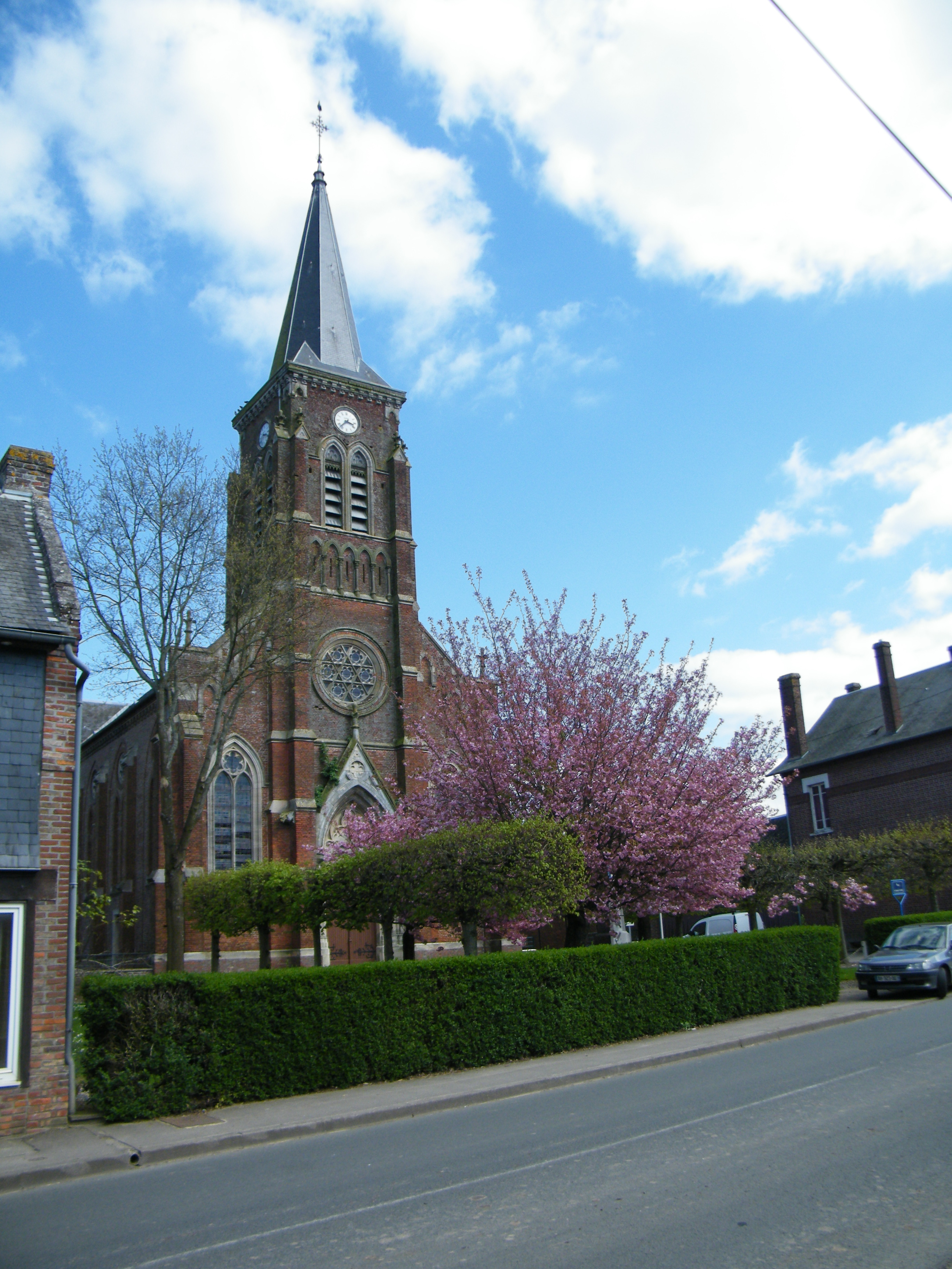 Église Saint-Pierre, près de la grand-route.